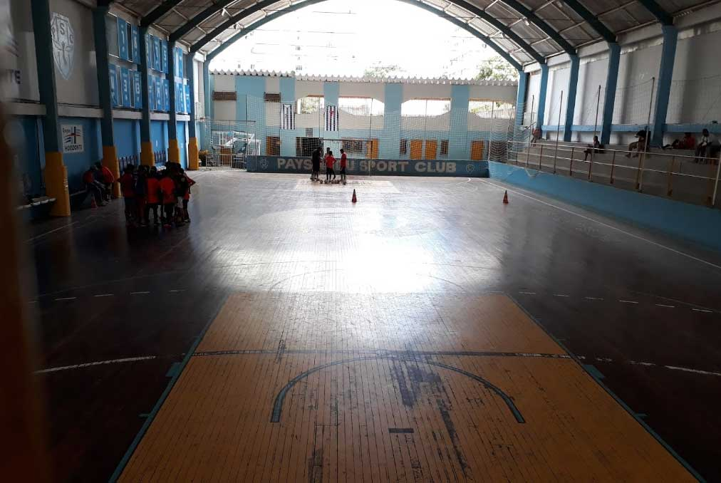 Quadra de Esportes do Paysandu